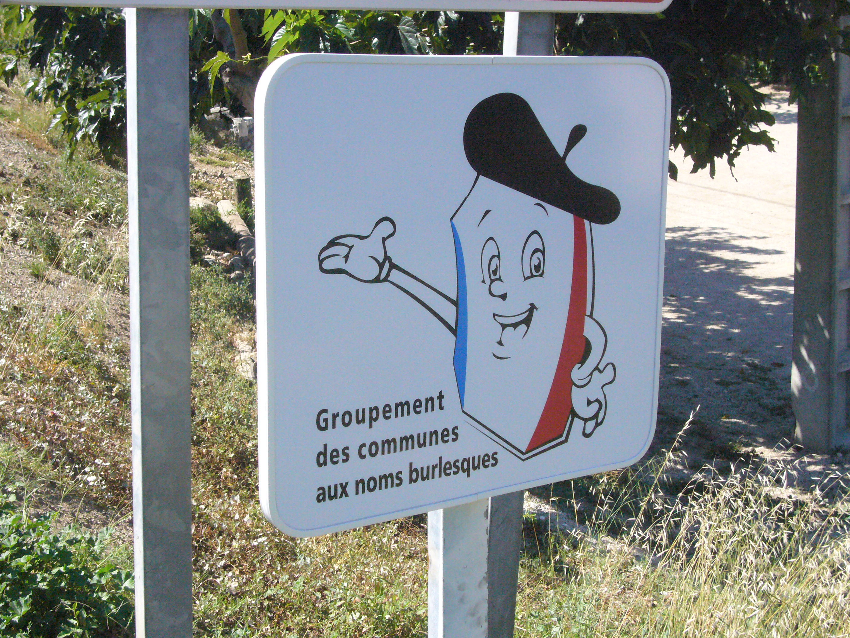 Panneau situé à l'entrée de Saint-Arnac (Pyrénées-Orientales, France), membre de l'Association des communes de France aux noms burlesques et chantants.